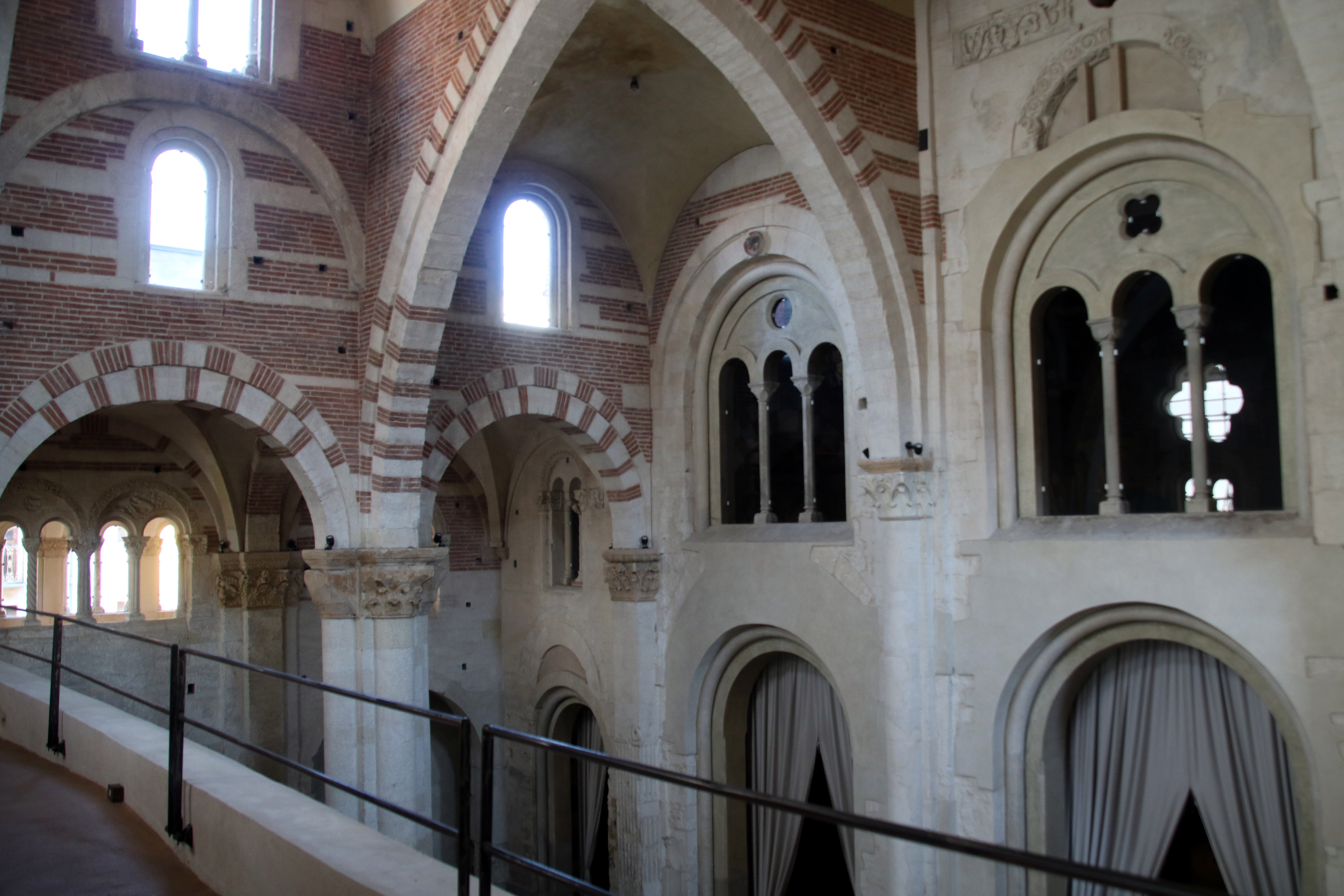 duomo di Sant'Evasio This is a photo of a monument which is part of cultural heritage of Italy.